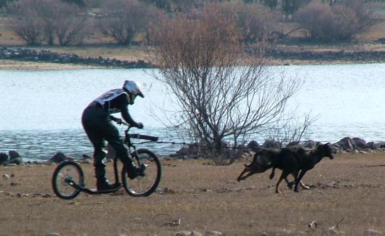 Campeonato Español de Mushing 2010